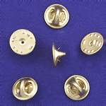 Bunchclutch, spilla di innesto maschio-femmina per applicare distintivi o simili su capi di abbigliamento.